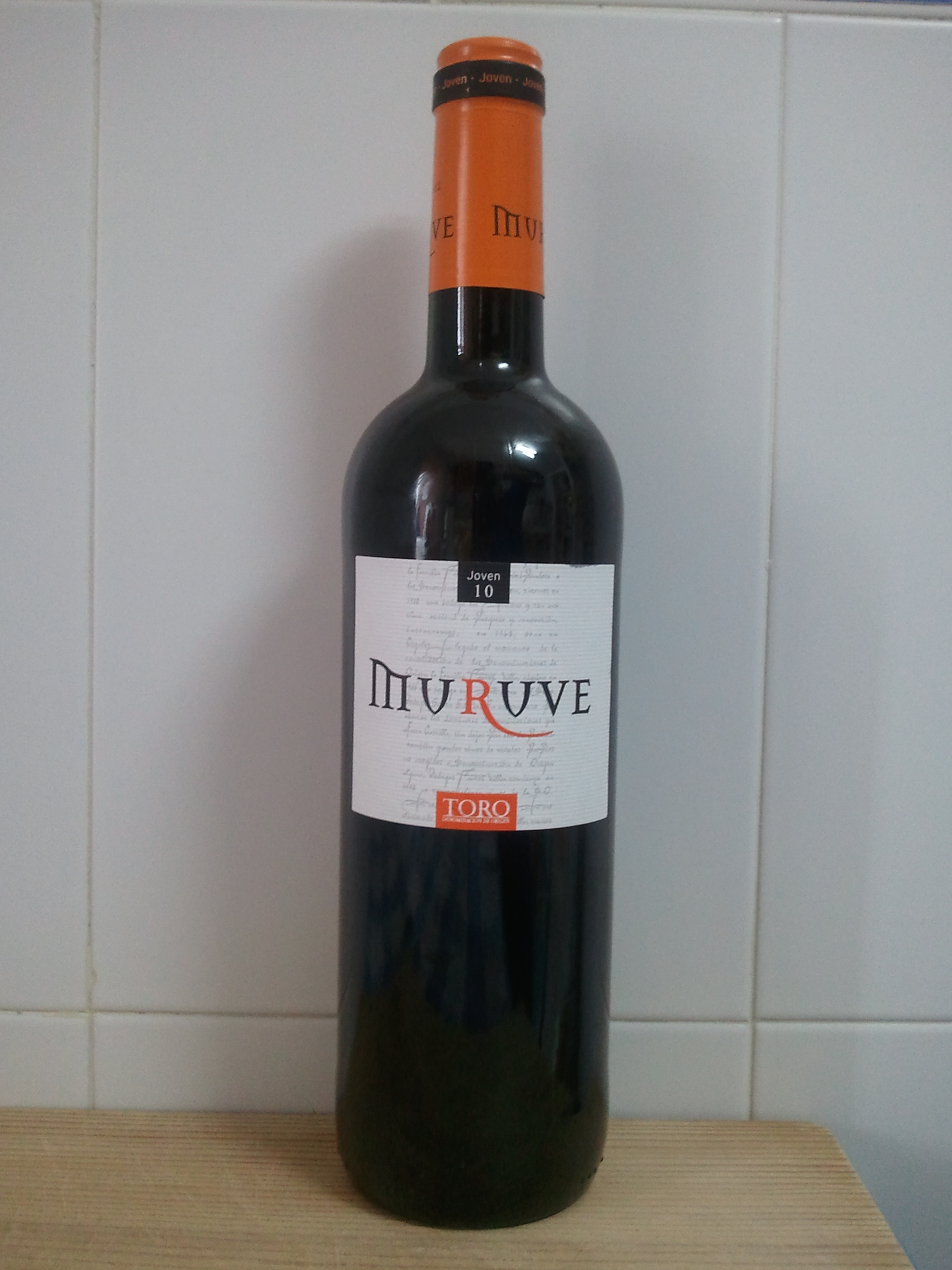 Vino de Toro, Zamora, España.